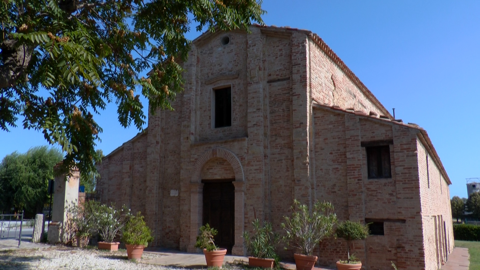 L'Abbazia di San Gervasio (V-VI sec.) sorge al centro di un'area archeologica. Il suo titolo ha un chiaro riferimento alla Bulgaria, denominazione risalente all’alto medioevo e all’insediamento di popolazioni barbariche in questo tratto del basso Cesano. This is a photo of a monument which is part of cultural heritage of Italy.